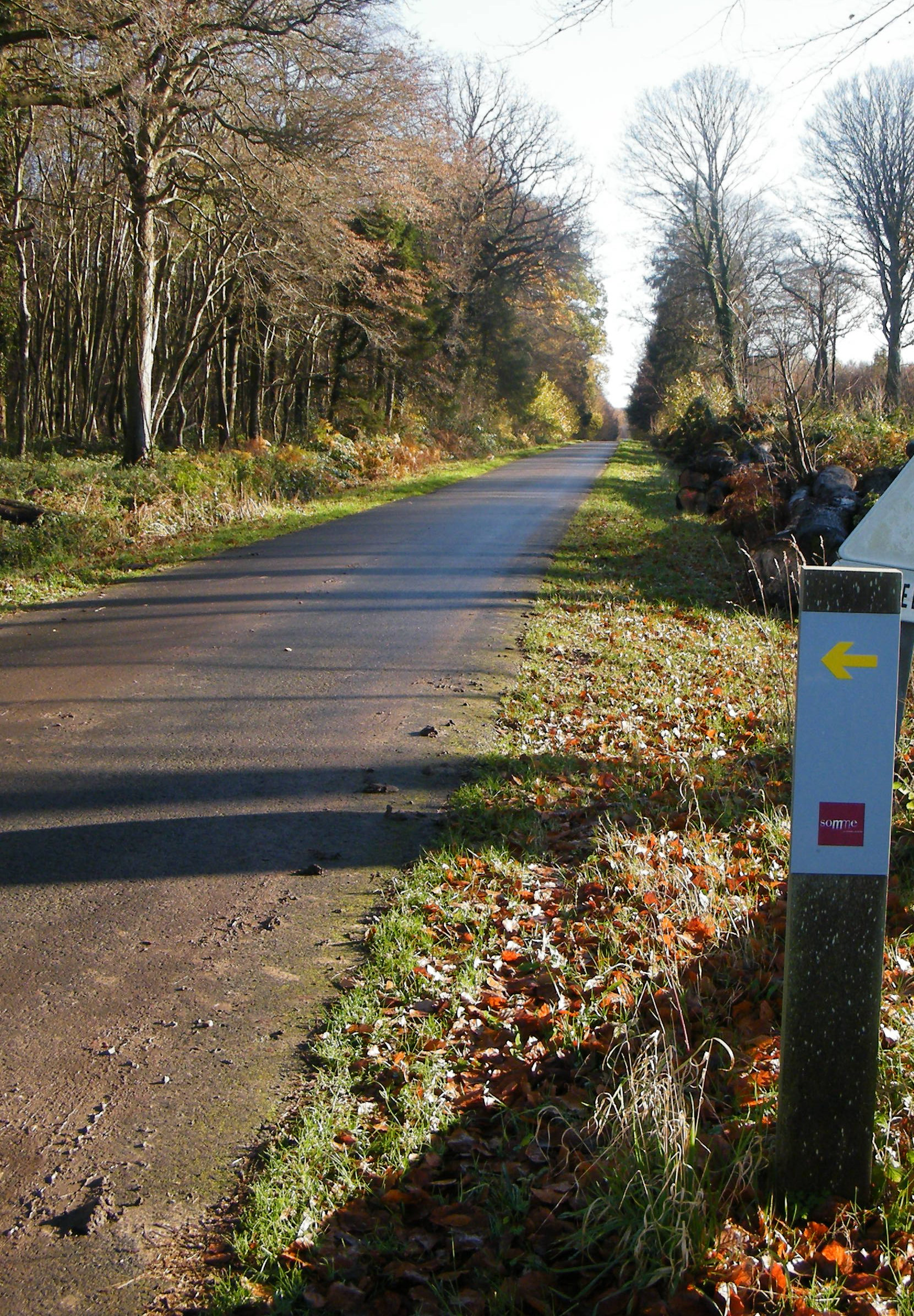 Forest-Montiers entrée forêt de Crécy, promenade des Enclaves.